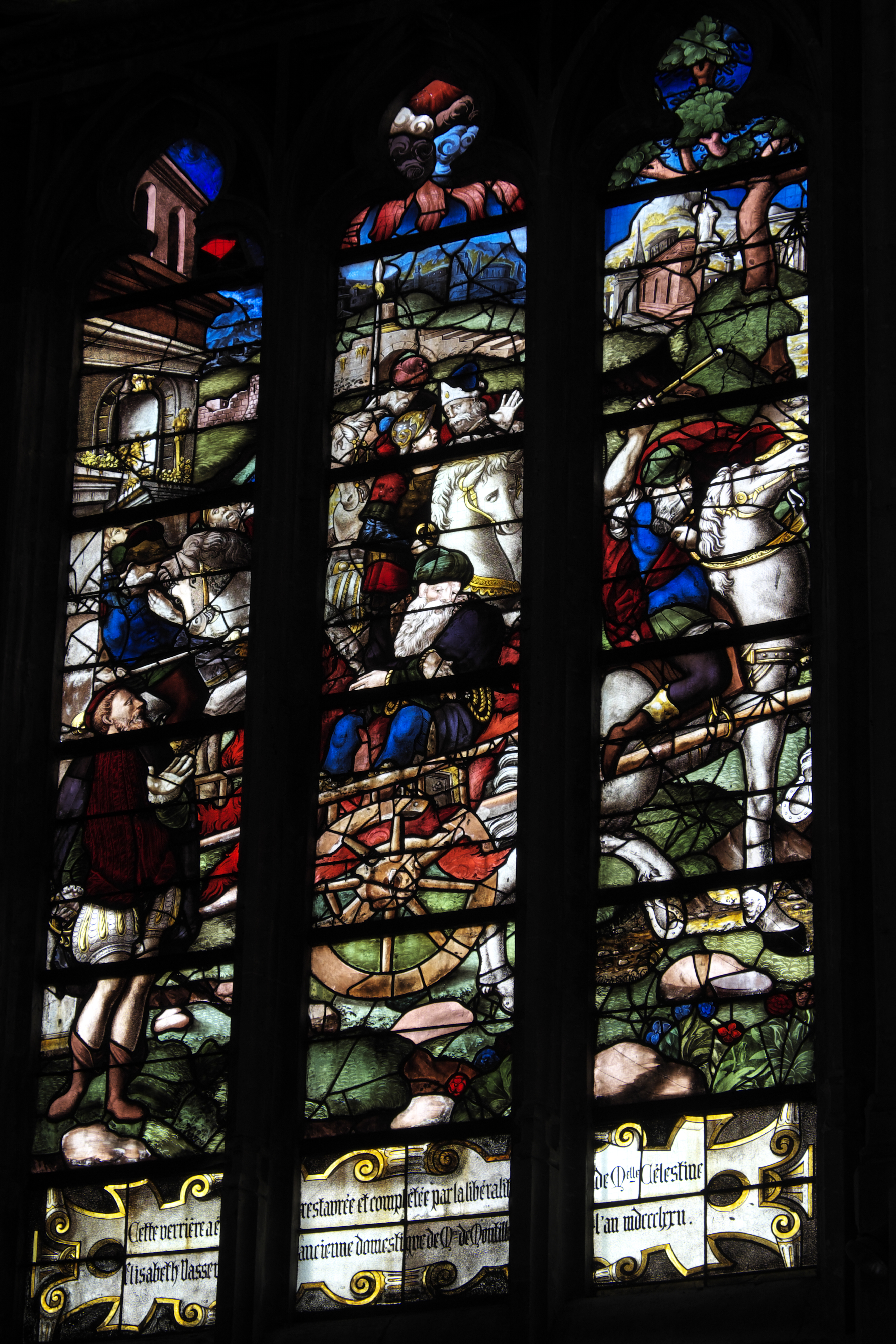 Katholische Kirche Saint-Pierre und Saint-Paul in Aumale im Département Seine-Maritime (Haute-Normandie/Frankreich), Bleiglasfenster mit Fragmenten aus dem 16. Jahrhundert, Darstellung: Bekehrung des Apostels Paulus